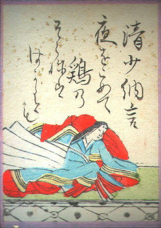 Sei Shonagon (清少納言)